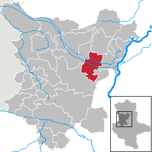 Niedere Börde in Saxony-Anhalt (Country) - District (Landkreis) Börde